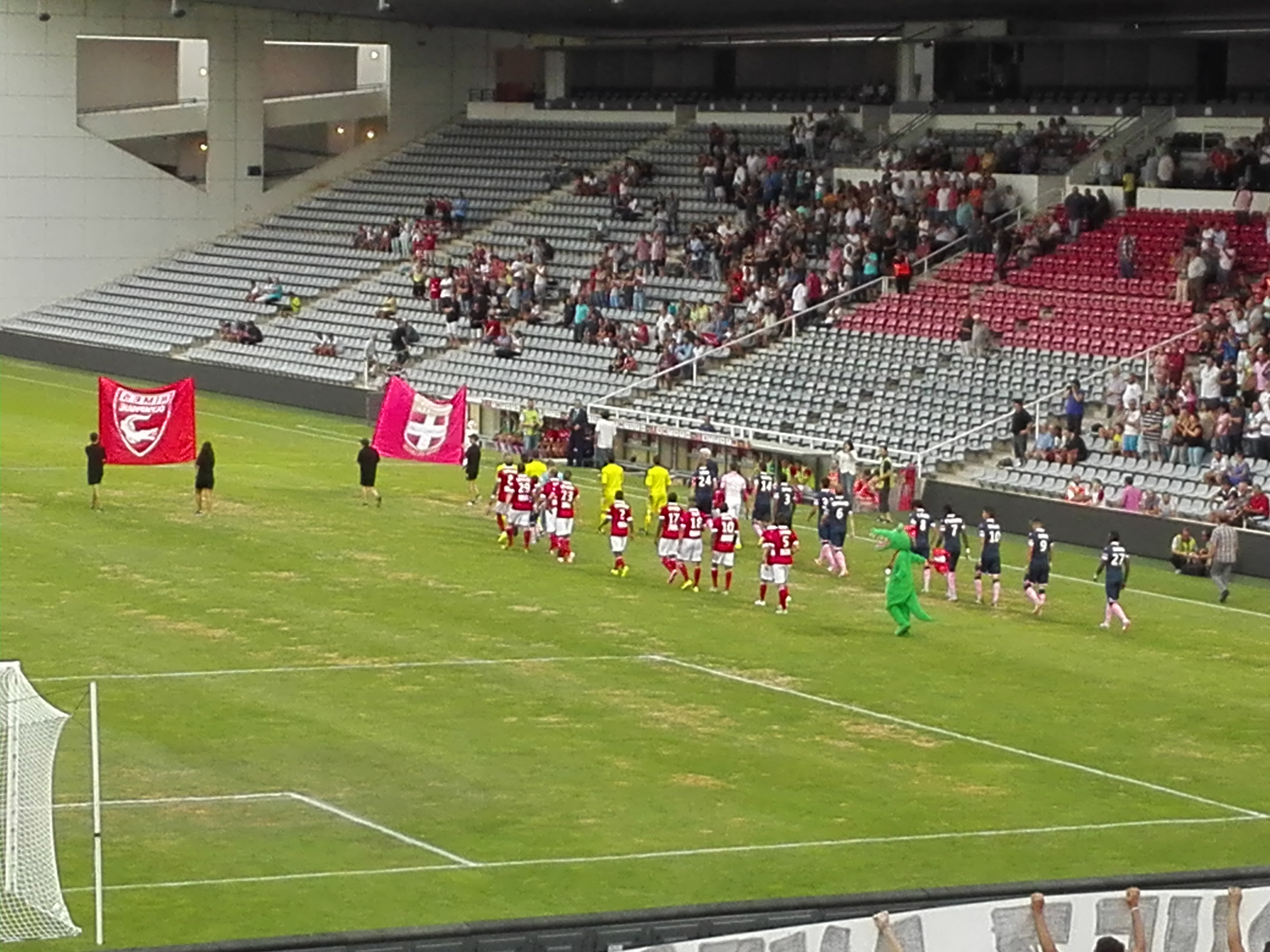 Entrée des joueurs lors du match opposant le Nîmes Olympique et Évian-Thonon-Gaillard au Stade des Costières pour le compte de la première journée de Ligue 2 de la saison 2015/2016.